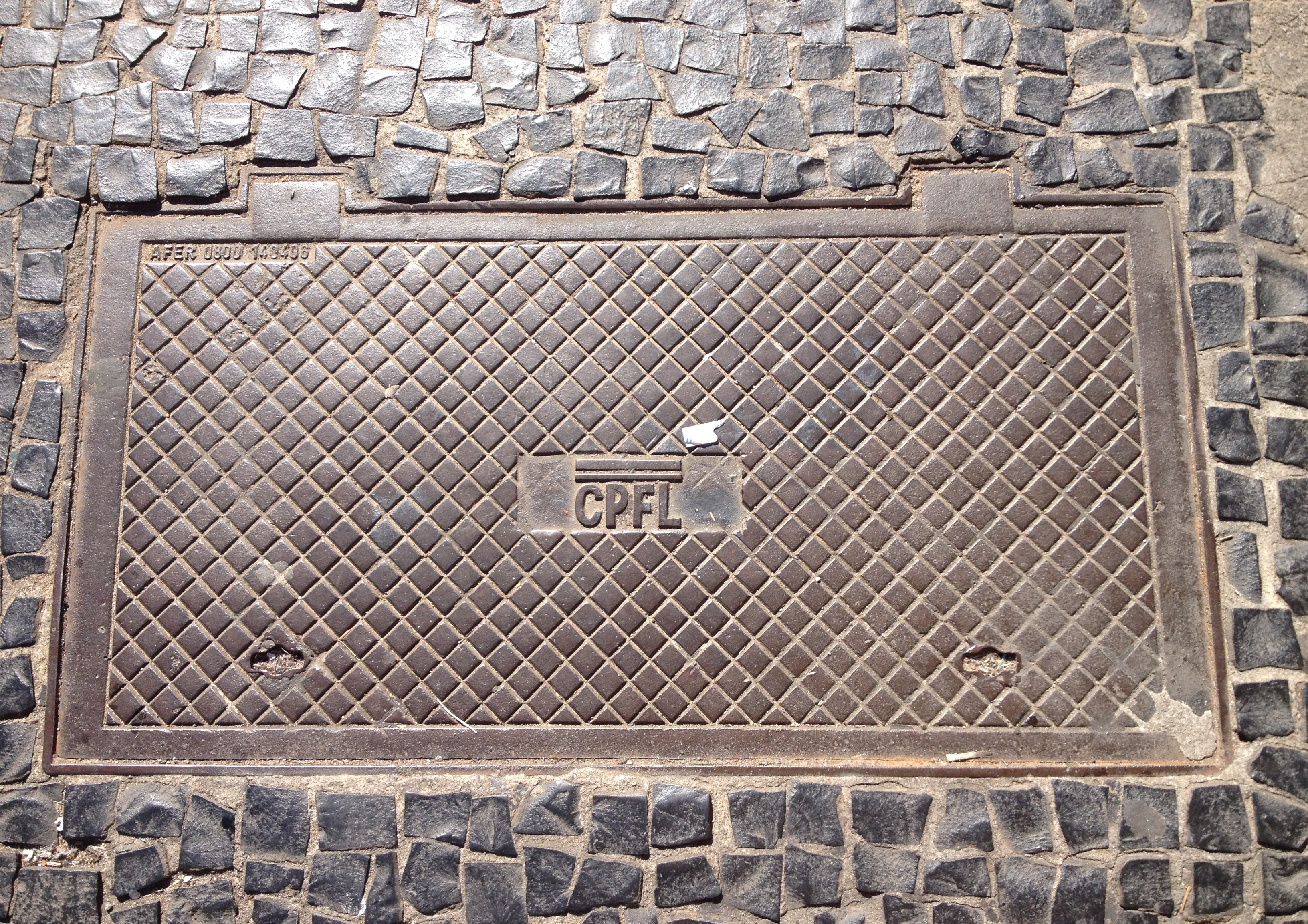 Poço de Visita retangular de energia elétrica. Companhia Paulista de Força e Luz. Campinas, SP.